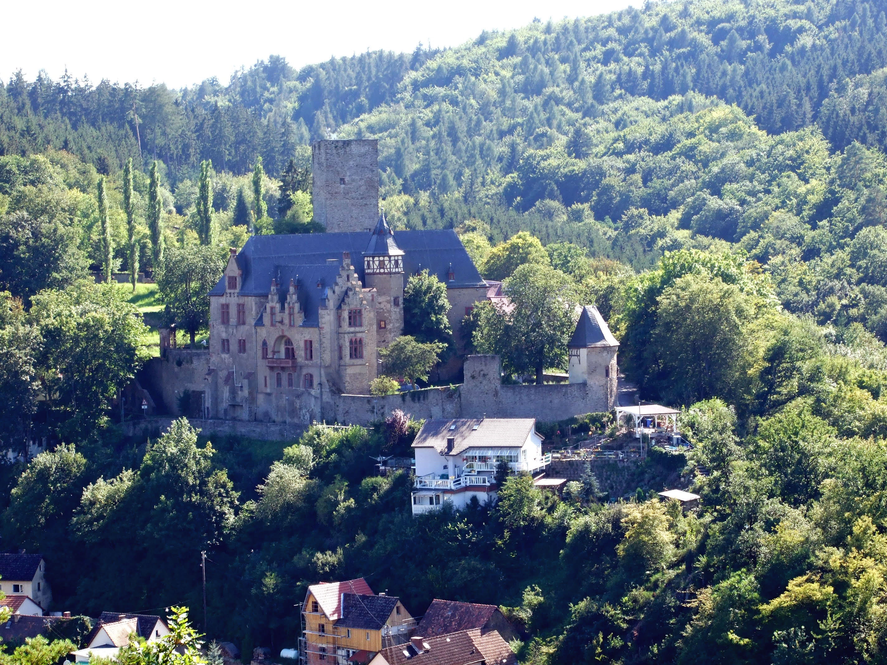 Schloss in Kransberg (Usingen)im Taunus